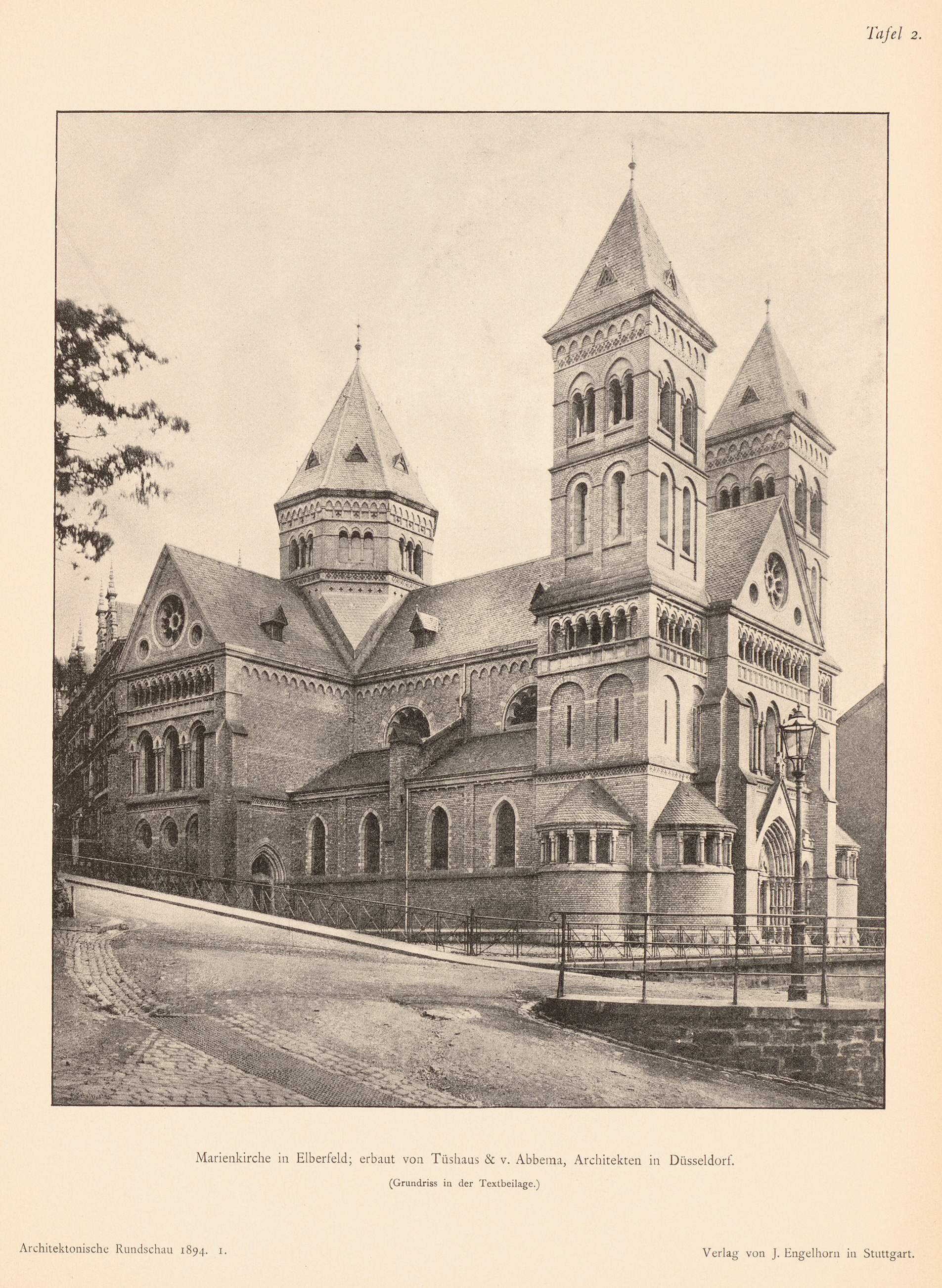 Marienkirche in Wuppertal-Elberfeld; erbaut von Tüshaus und Abbema; unter Denkmalschutz